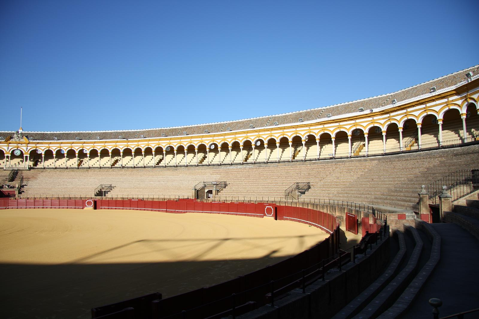 Plaza de Toros de La Maestranza de Sevilla, España. 2008